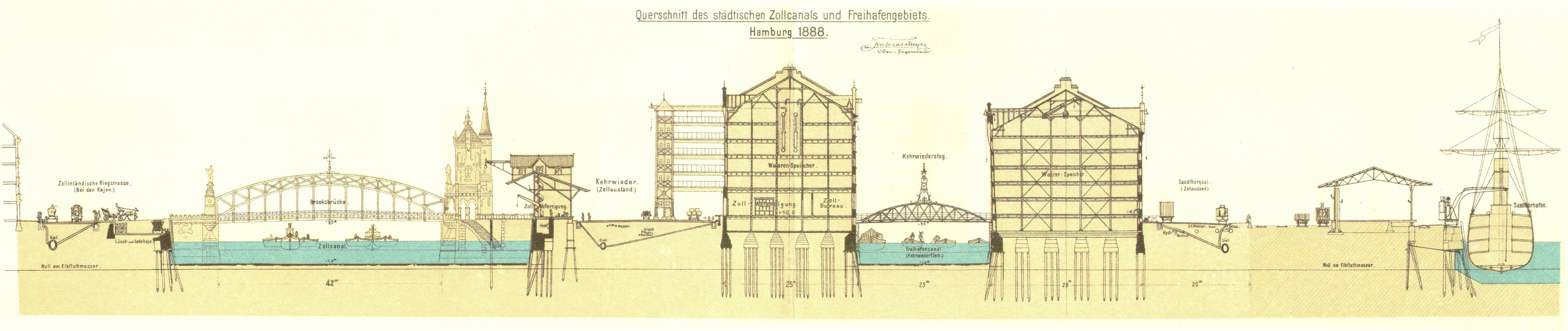 Querschnitt durch die Hamburger Speicherstadt in Nord-Süd Richtung. Eingescannt und bearbeitet von Benutzer:Flo Beck This is a photograph of an architectural monument. , 11813, 11975-11977, 12091, 12072-12086, 12189-12199, 12200, 12276-12279, 12333-12336, 12415-12419, 12424-12427, 12430-12034, 12419-12425, 12426, 12428, 12429, 12435-12473, 12478-12481, 12483-12489, 12498-12501, 12879-12886, 13378, 13725-13729, 14151, 14794, 14879-14896, 14969-14978